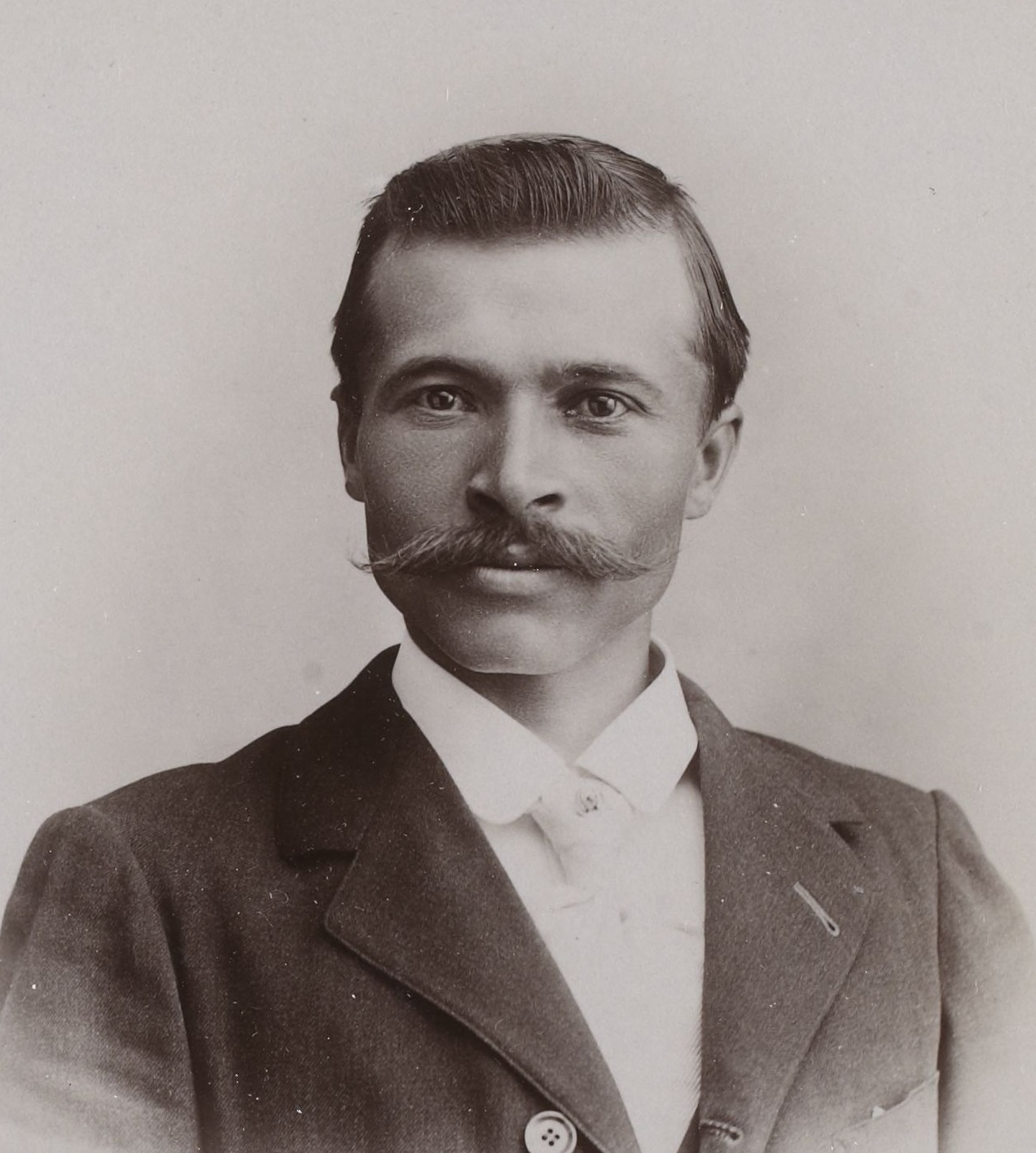 [Collection Jules Beau. Photographie sportive] : T. 14. Année 1901 / Jules Beau : F. 12v. [Grand Prix cycliste de la République, 23, 27, 30 juin 1901] ; Willy Arend ; Maurice Garin